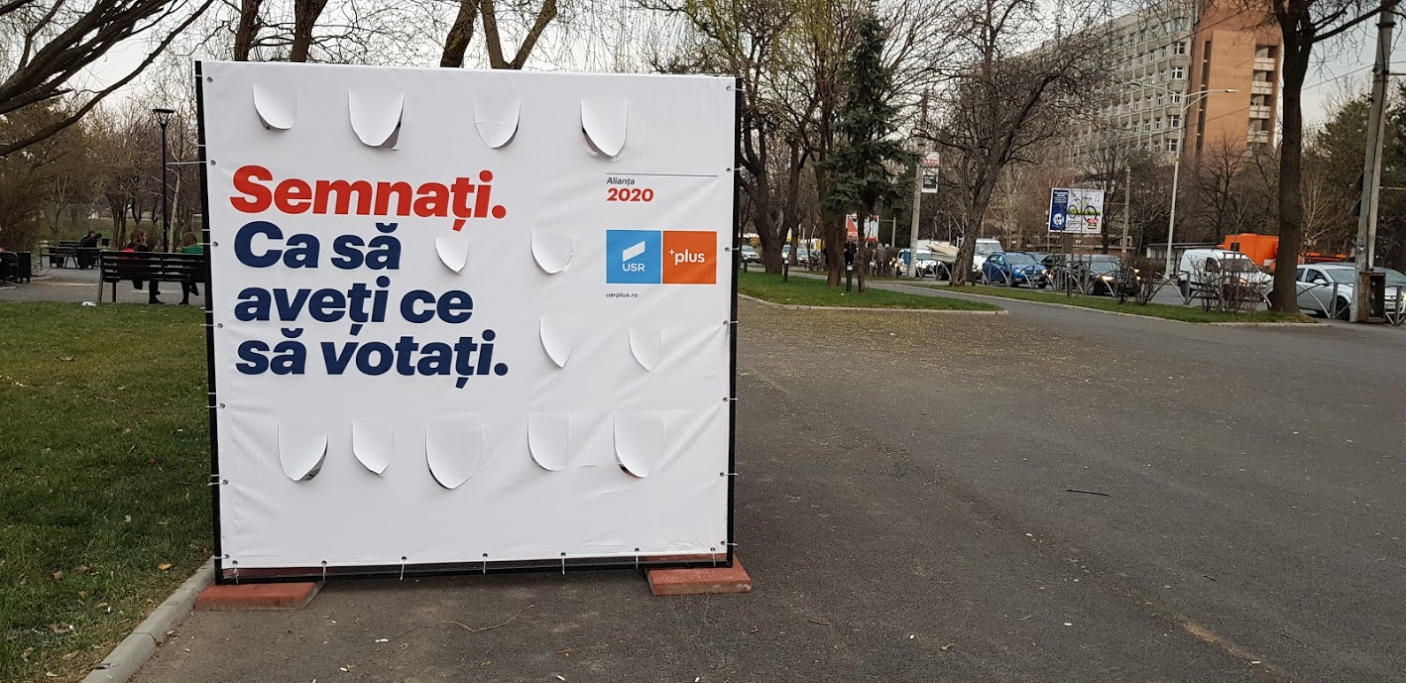 Corturi pentru strângere de semnături Alianța 2020 USR PLUS - alegeri europarlamentare 2019, București, Politehnică.